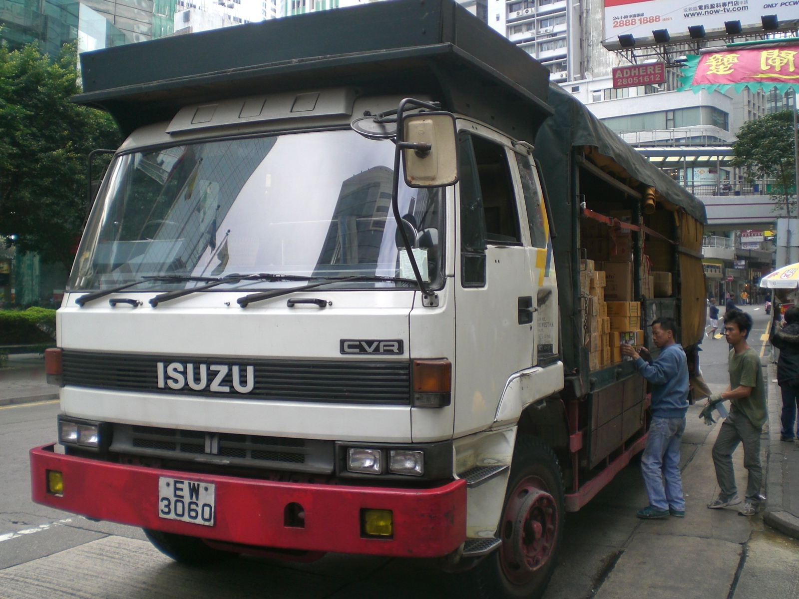 香港中環五十鈴C型大貨車，皇后大道中